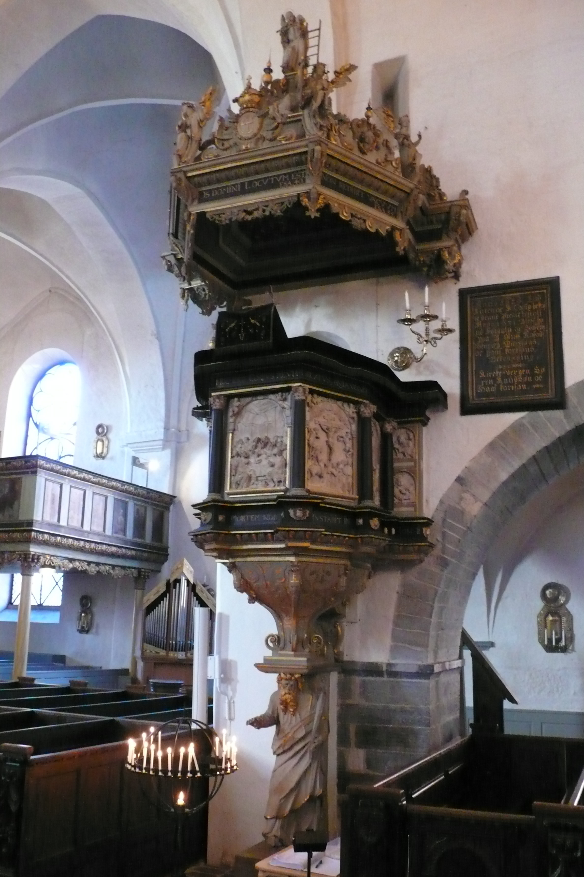 Kanzel in der Kirche Sankta Maria